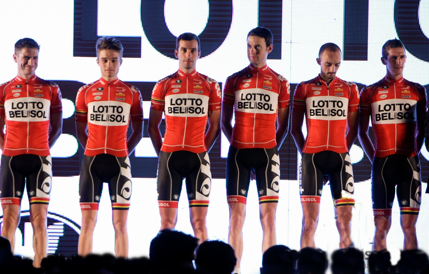 El Lotto Belisol en la Presentación del Tour de San Luis 2014.